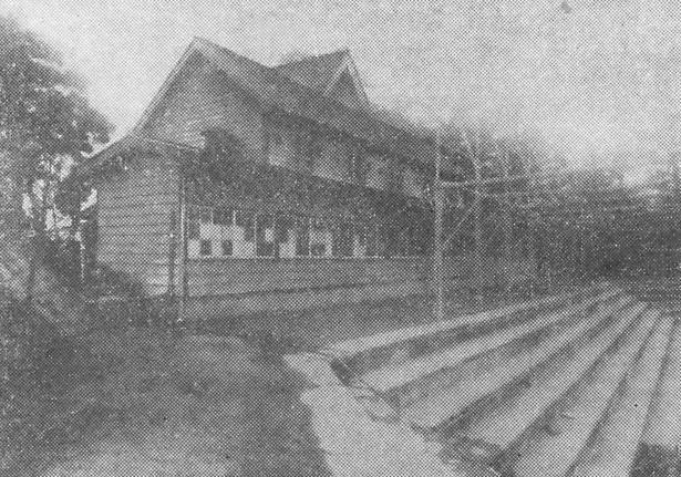 Clubhouse in Takarazuka stadium（ballpark of Japan,1922-1937）